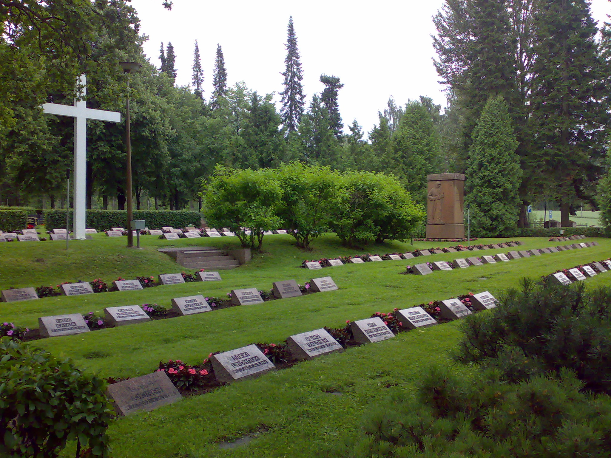 Janakkalan kirkko, sankarihaudat